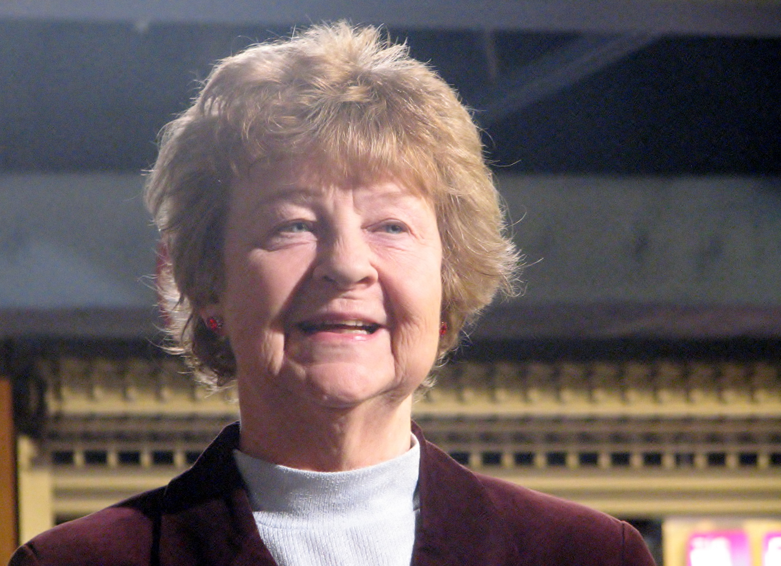 Malle Pärn esitlemas oma raamatut "Minu elu hetked"